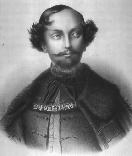 Mednyánszky László (1819-1849) honvéd őrnagy egy korabeli litográfián.